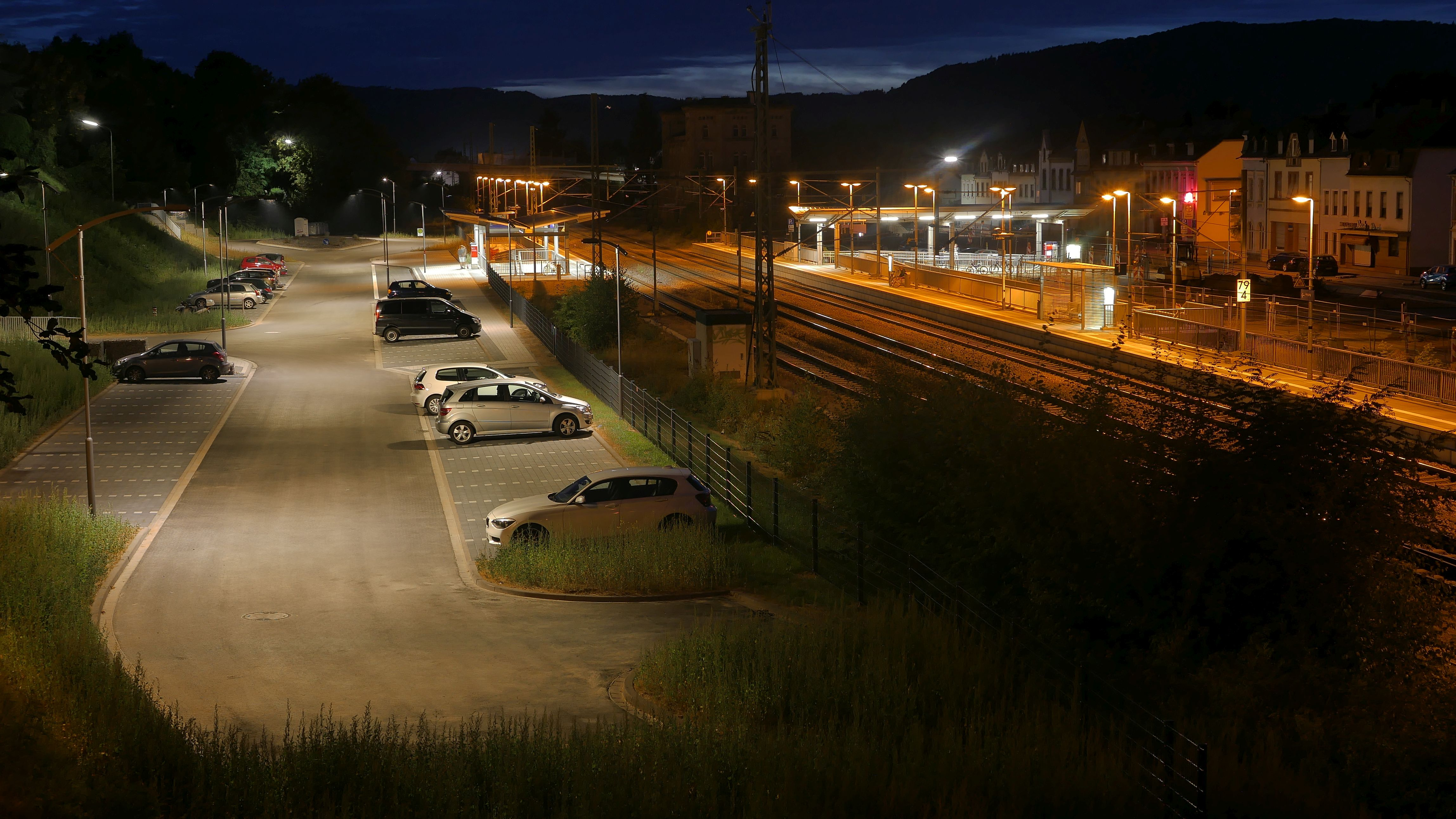 Konz (Rheinland-Pfalz), Neuer Haltepunkt "Konz Hauptbahnhof", wurde 2014 in Betrieb genommen. Links daneben Park-and-Ride-Platz und Bushaltestelle